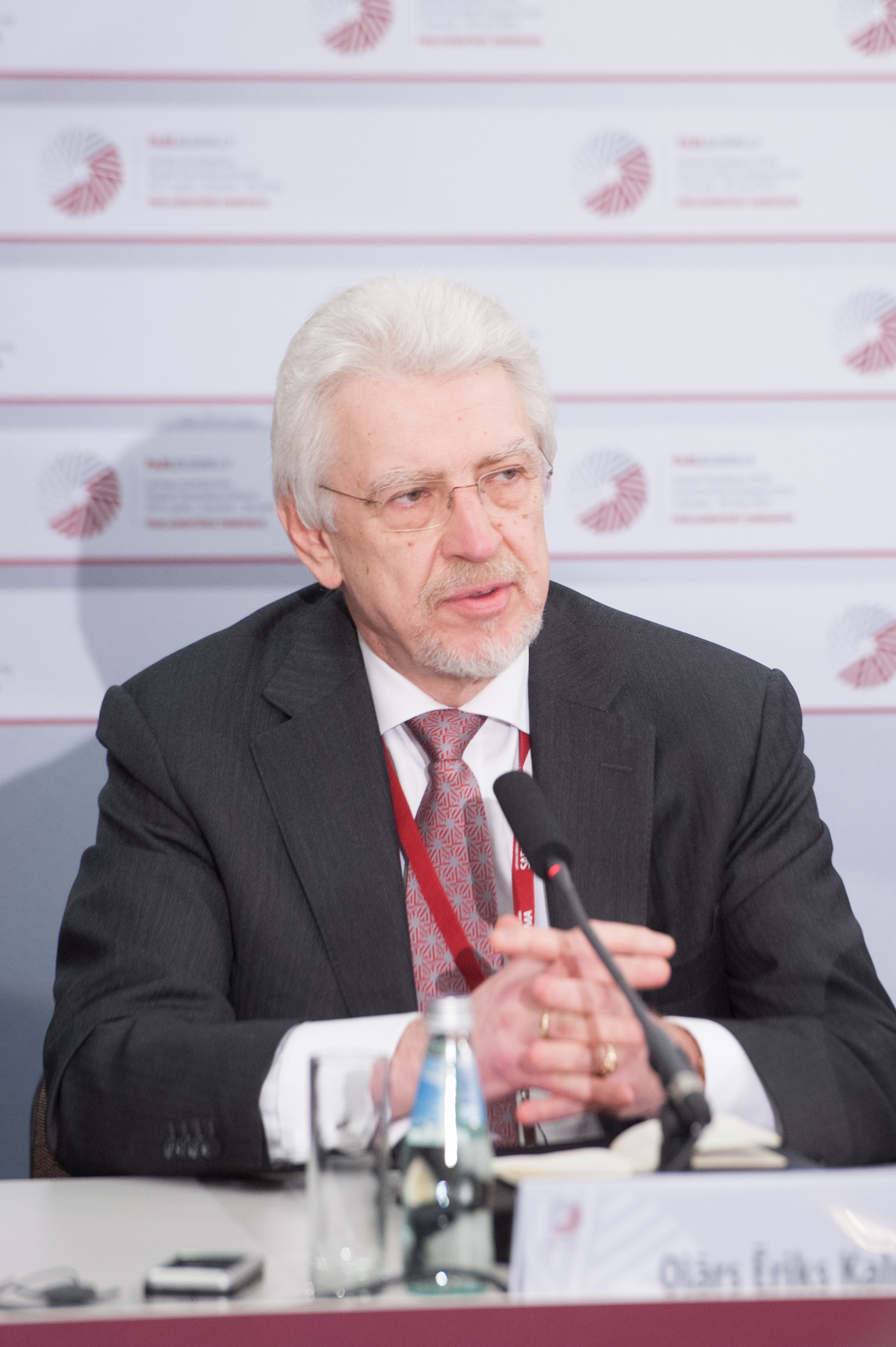 2015.gada 5.marts. Preses konference pēc Starpparlamentārās konferences par kopējo ārpolitiku un drošības politiku, kā arī kopējo drošības un aizsardzības politiku pirmās sesijas. Foto: Reinis Inkēns, Saeimas Kanceleja Izmantošanas noteikumi: saeima.lv/lv/autortiesibas